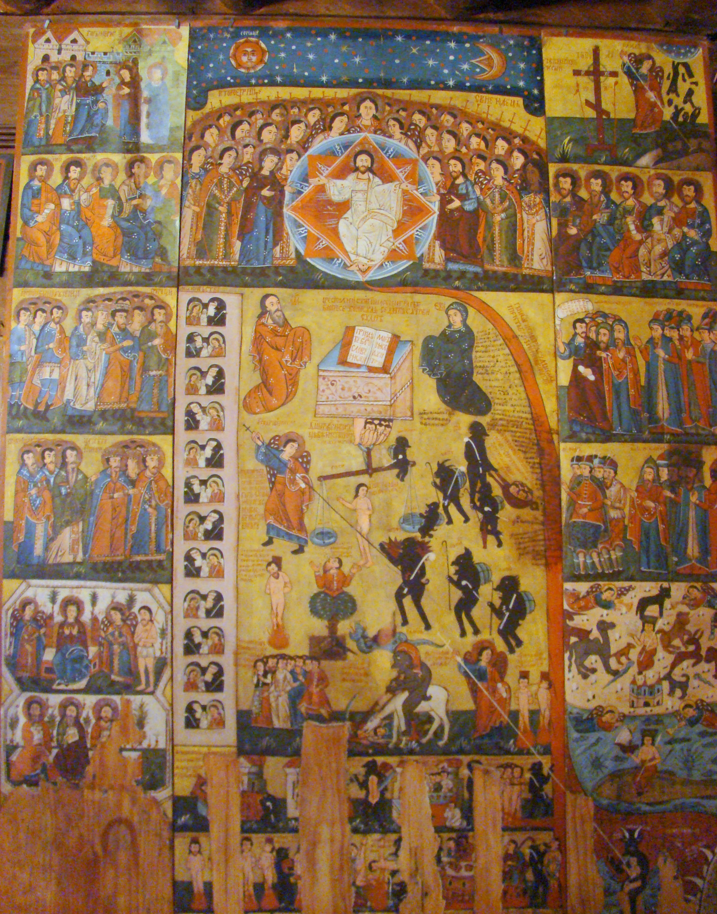 Biserica de lemn din Budești-Josani, județul Maramureș